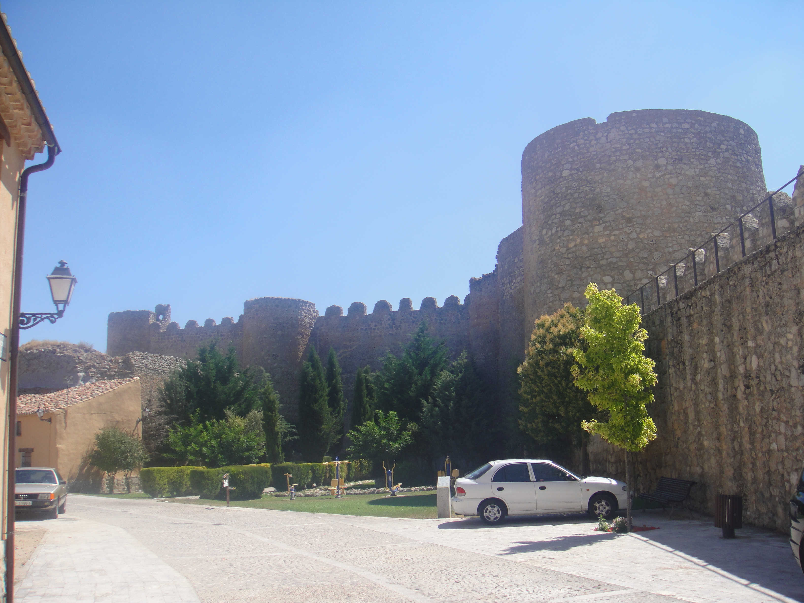 Murallas de Urueña, provincia de Valladolid, (España).